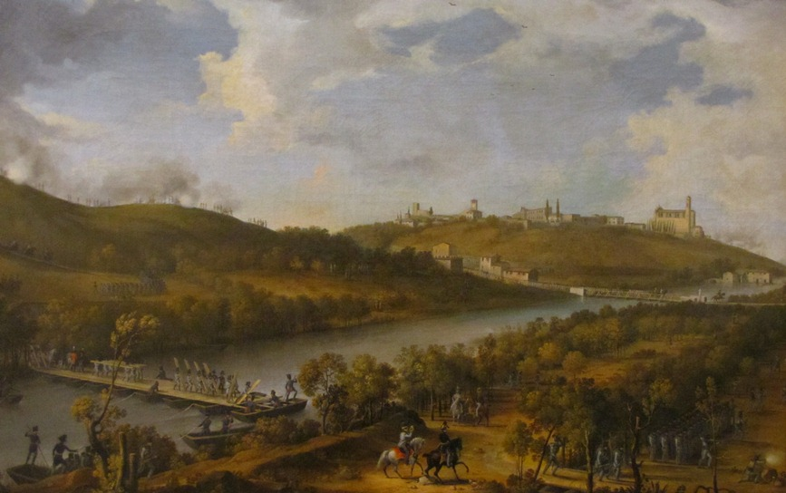 Flussübergang österreichischer Pontoneure in Oberitalien, 1834.